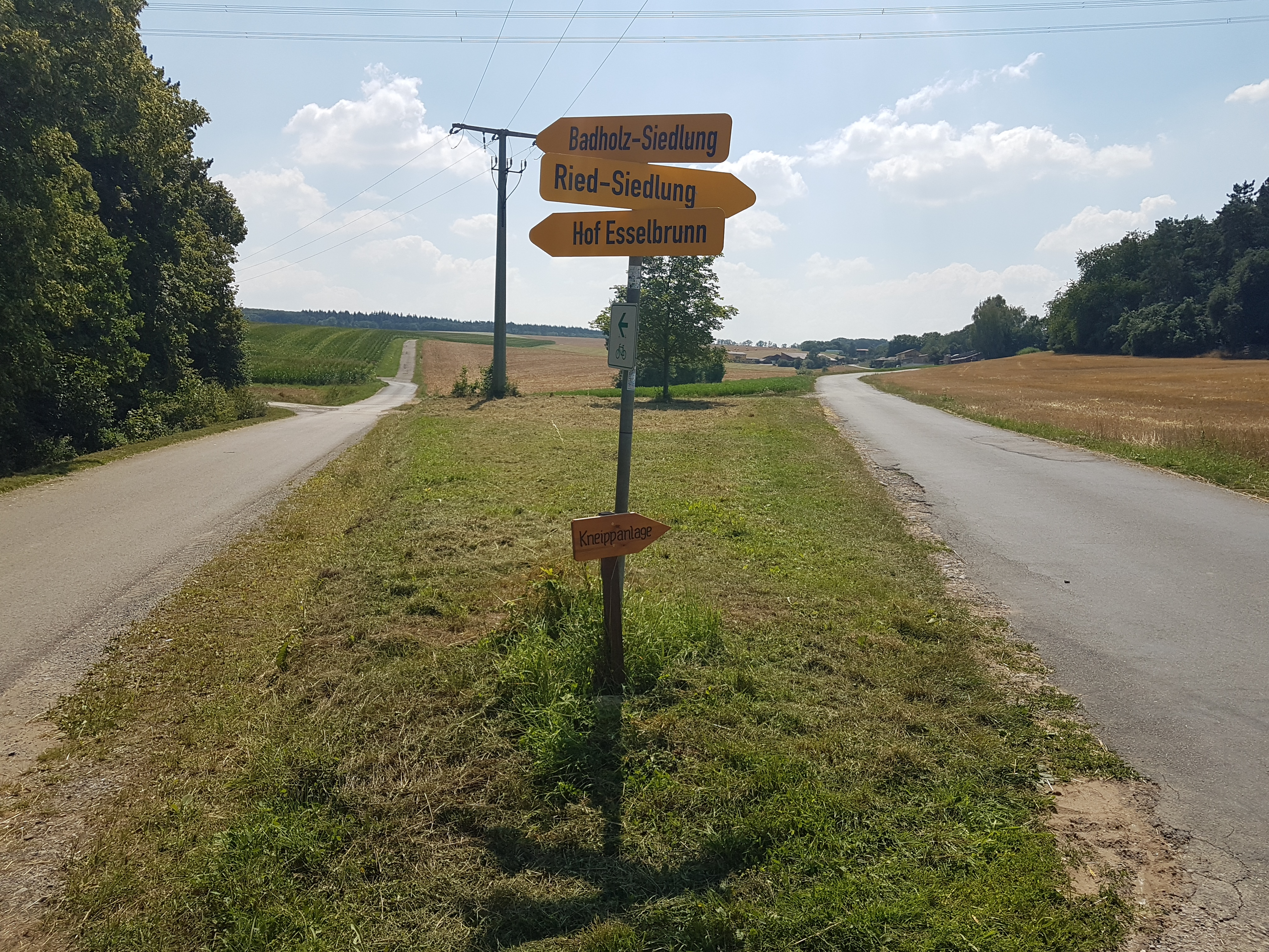 Abzweigung Hof Esselbrunn, Badholz-Siedlung, Ried-Siedlung und Kneippanlage bei Gissigheim